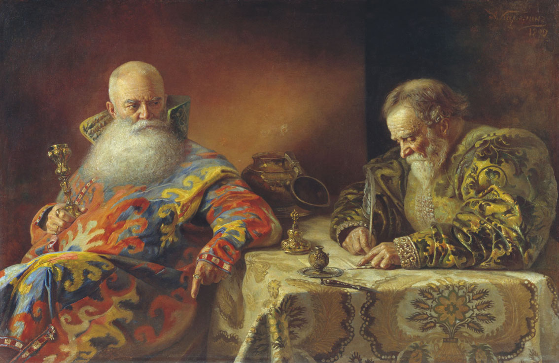 Карелин Андрей Андреевич (1866 - 1928). Пишут наказ. 1890 Холст, масло. 100 x 155 см